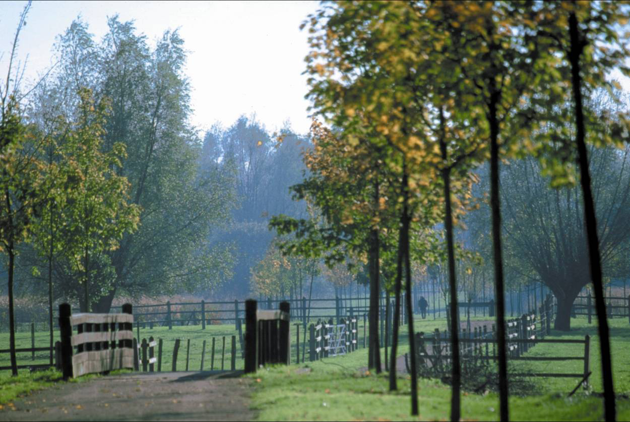 Parc de la Deûle, les pâtures de Wavrin (Nord-Pas-de-Calais, France)